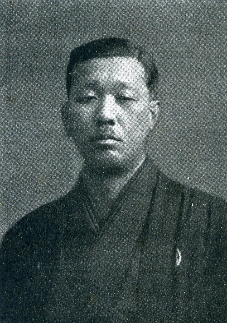 この写真は、高見之通（1880-1962）の写真です。